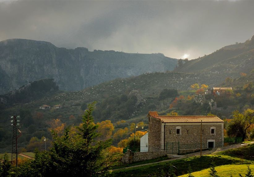 Chiesa rurale SS. Madonna Odigitria "te mali", prima chiesa costruita dagli esuli albanesi fondatori della cittadina (1488). Piana degli Albanesi, Sicilia, Italia. Foto di Giorgio Lucito.